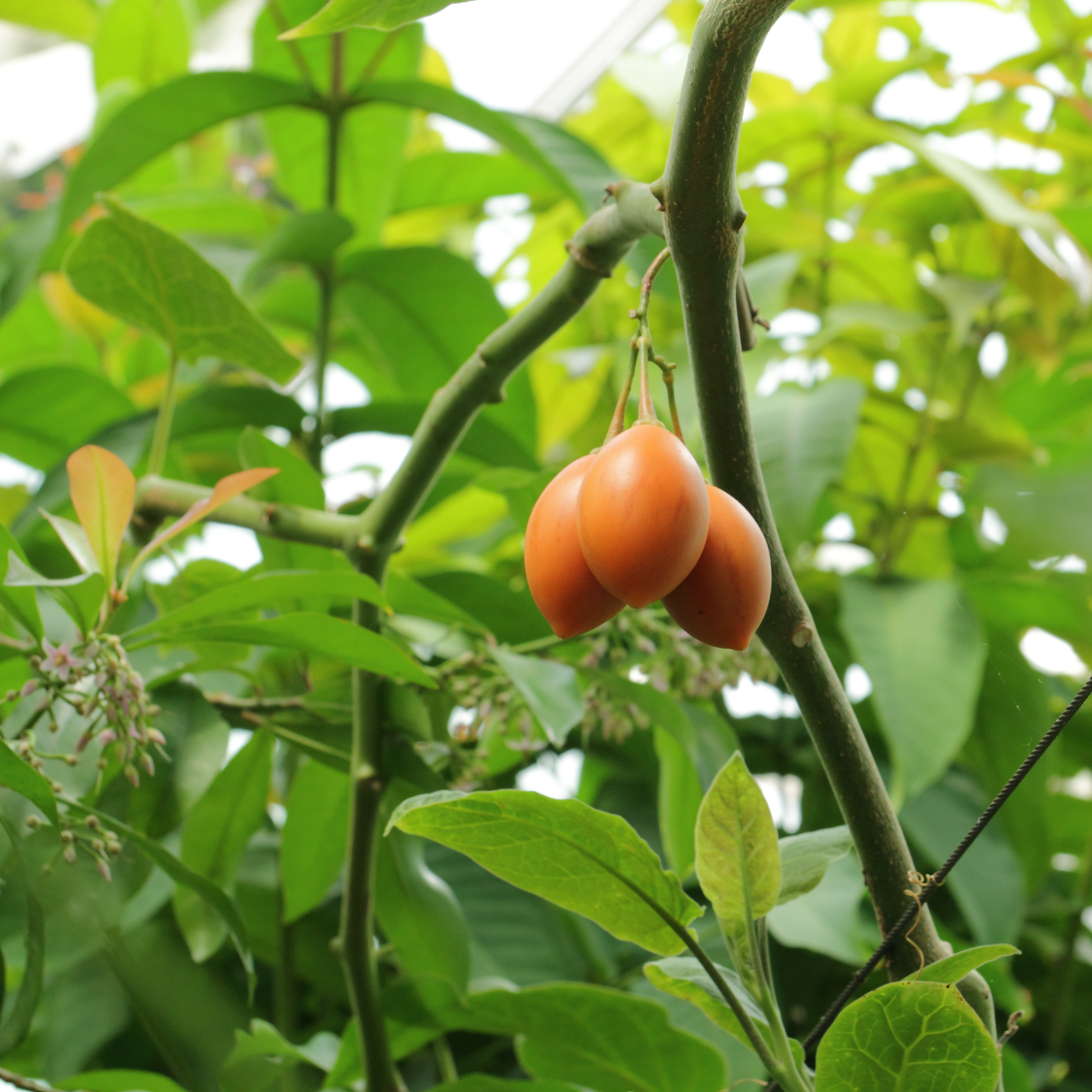 Solanum betaceum , identifierad med hjälp av befintlig skylt vid Bergianska trädgården.